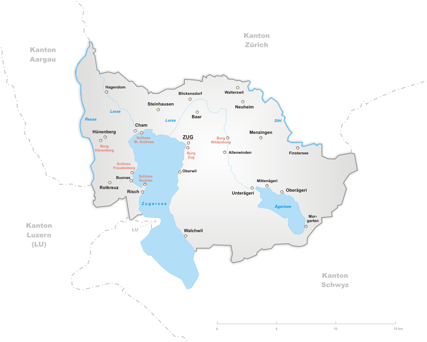 Karte der Burgen und Schlösser des Kanton Zug.